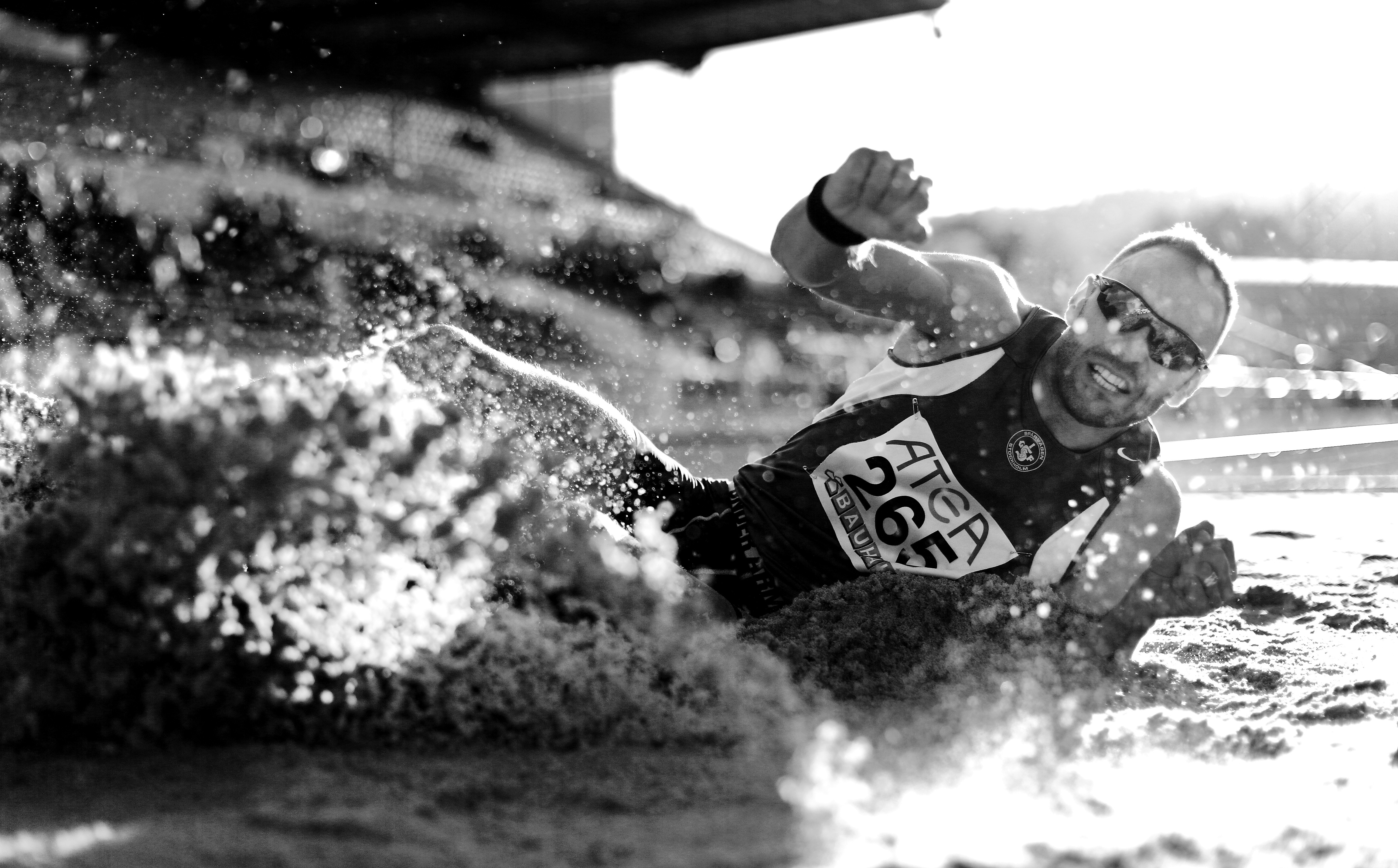 Mattias Sunneborn i längdhoppsgropen